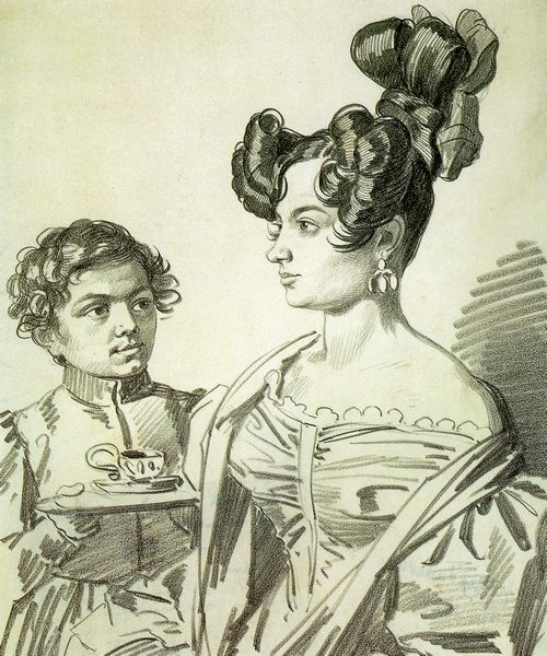 Наталья Александровна Щербатова (1800-е-нач.1850-х), фрейлина, дочь Прасковьи Сергеевны Одоевской (1773-1851) и Александра Александровича Щербатова (1766-1834); в нее был влюблен В.Ф.Одоевский; была замужем за Михаилом Карловичем Розеном (1796-1873).